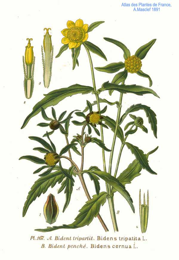 Bidens tripartita L., B. cernua L.